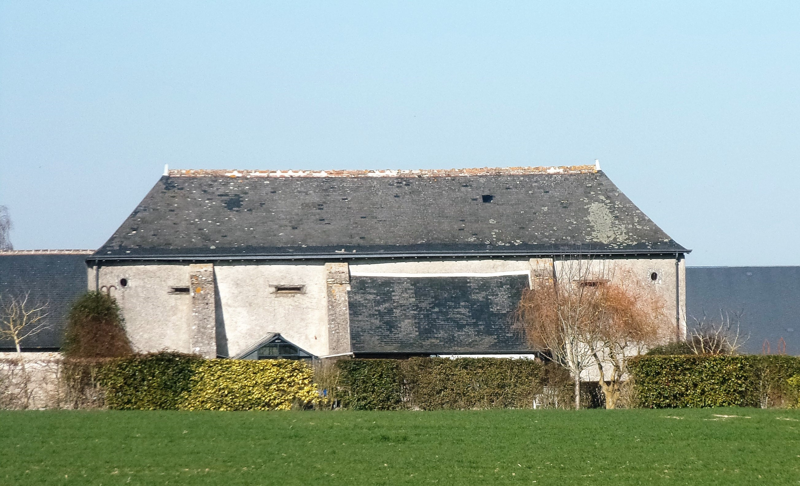 Dépendance du manoir de la Belle-Jonchère (Veigné)